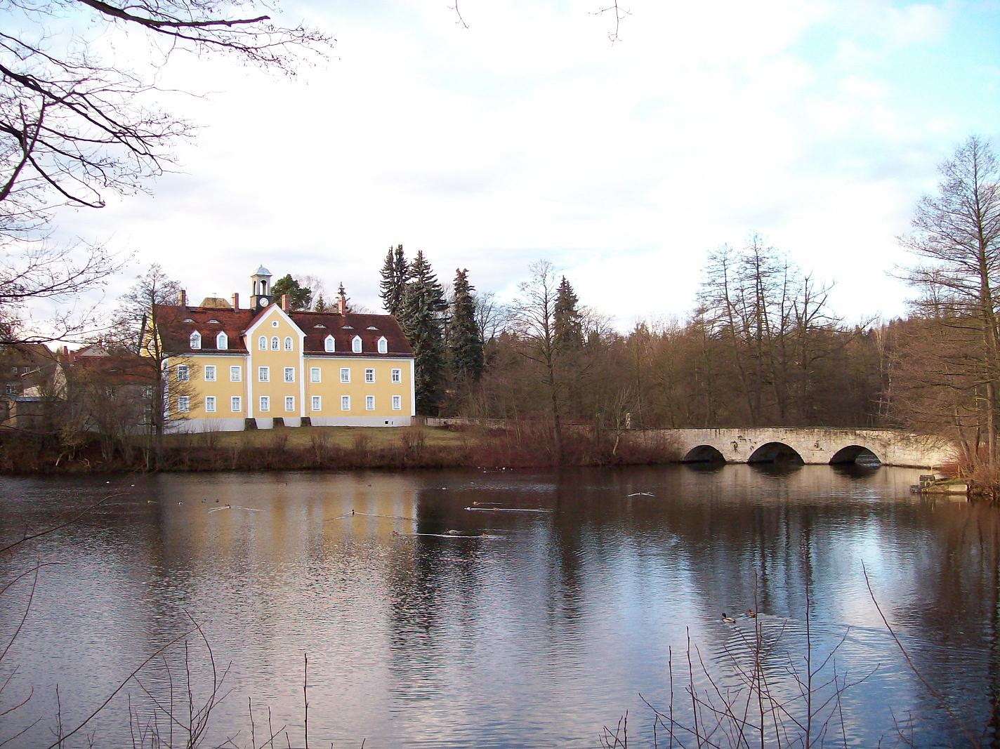 Jagdschloss Grillenburg mit Brücke